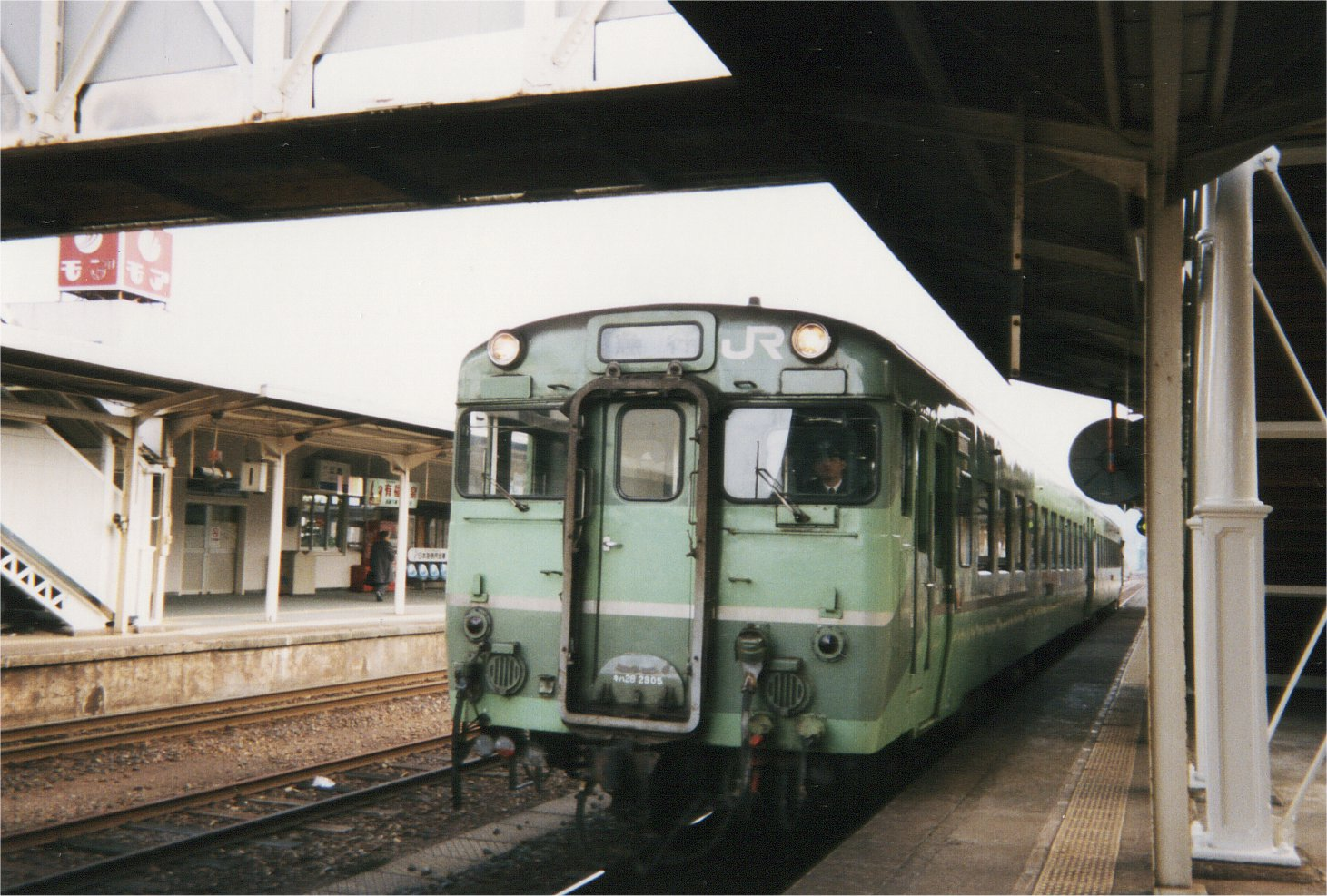 急行さんべ廃止の日。江津駅にて。